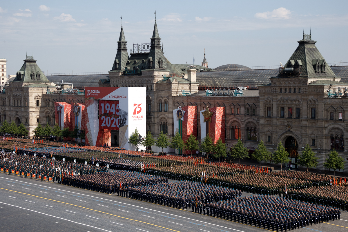 Парад Победы в Москве, посвященный 75-й годовщине Победы в Великой Отечественной войне